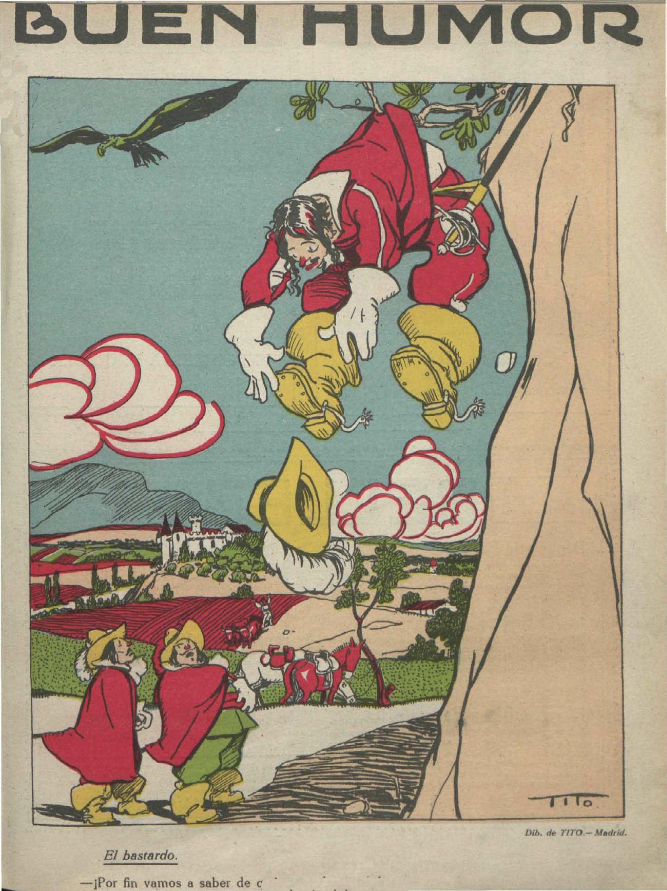 El bastardo.